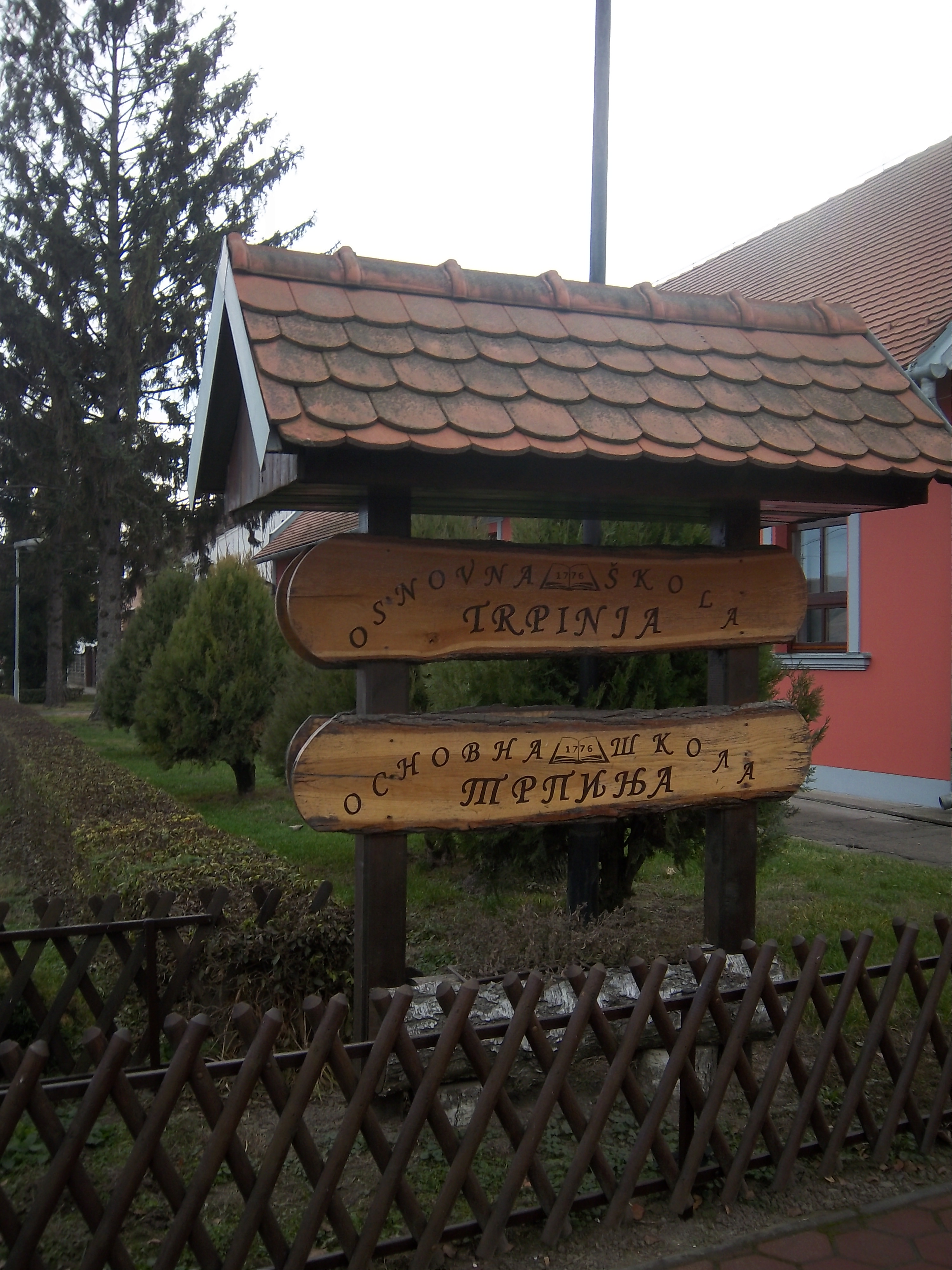 Škola u Trpinji